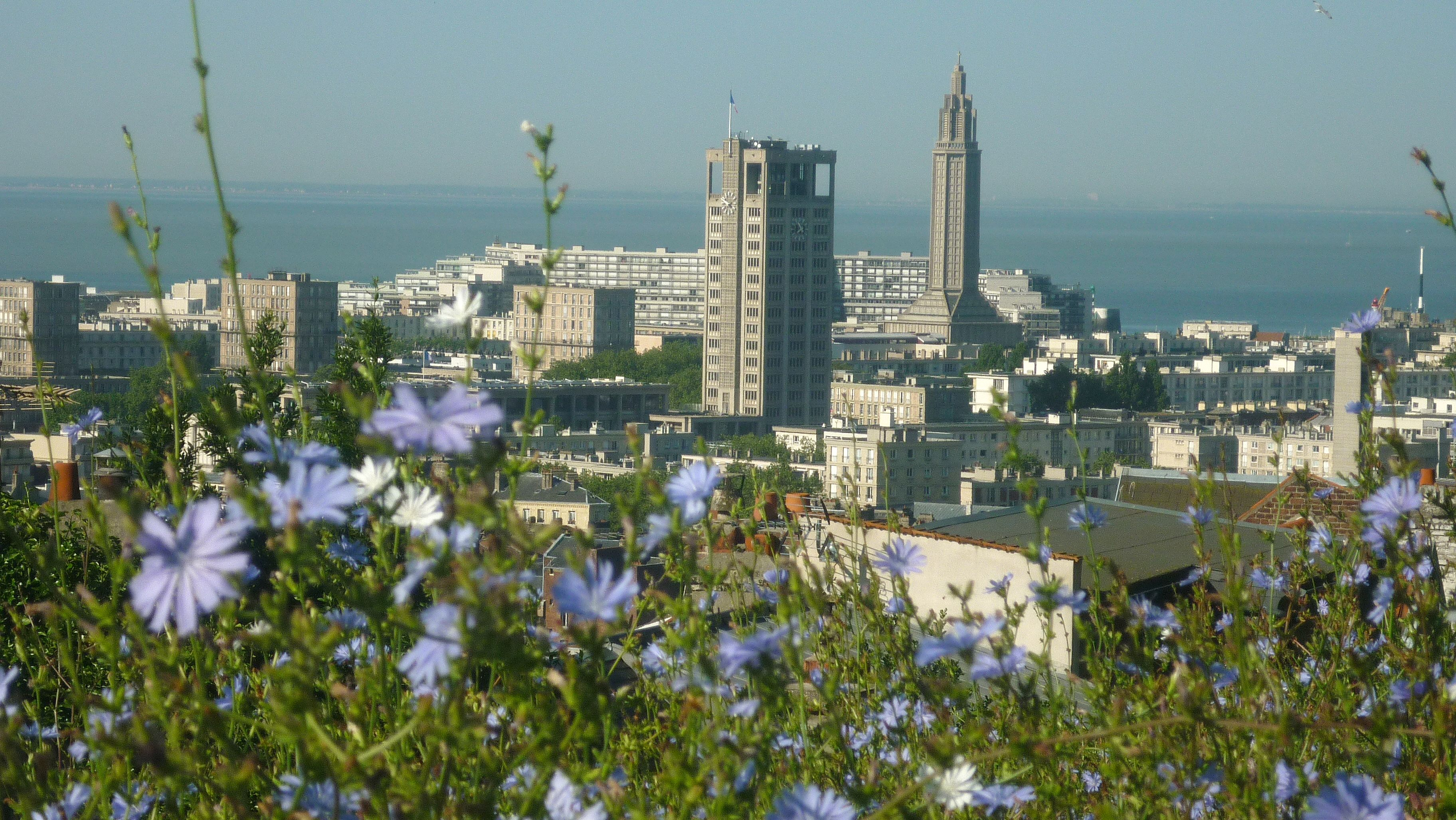 Panorama de la ville basse du Havre : hôtel de ville, église Saint-Joseph et mer